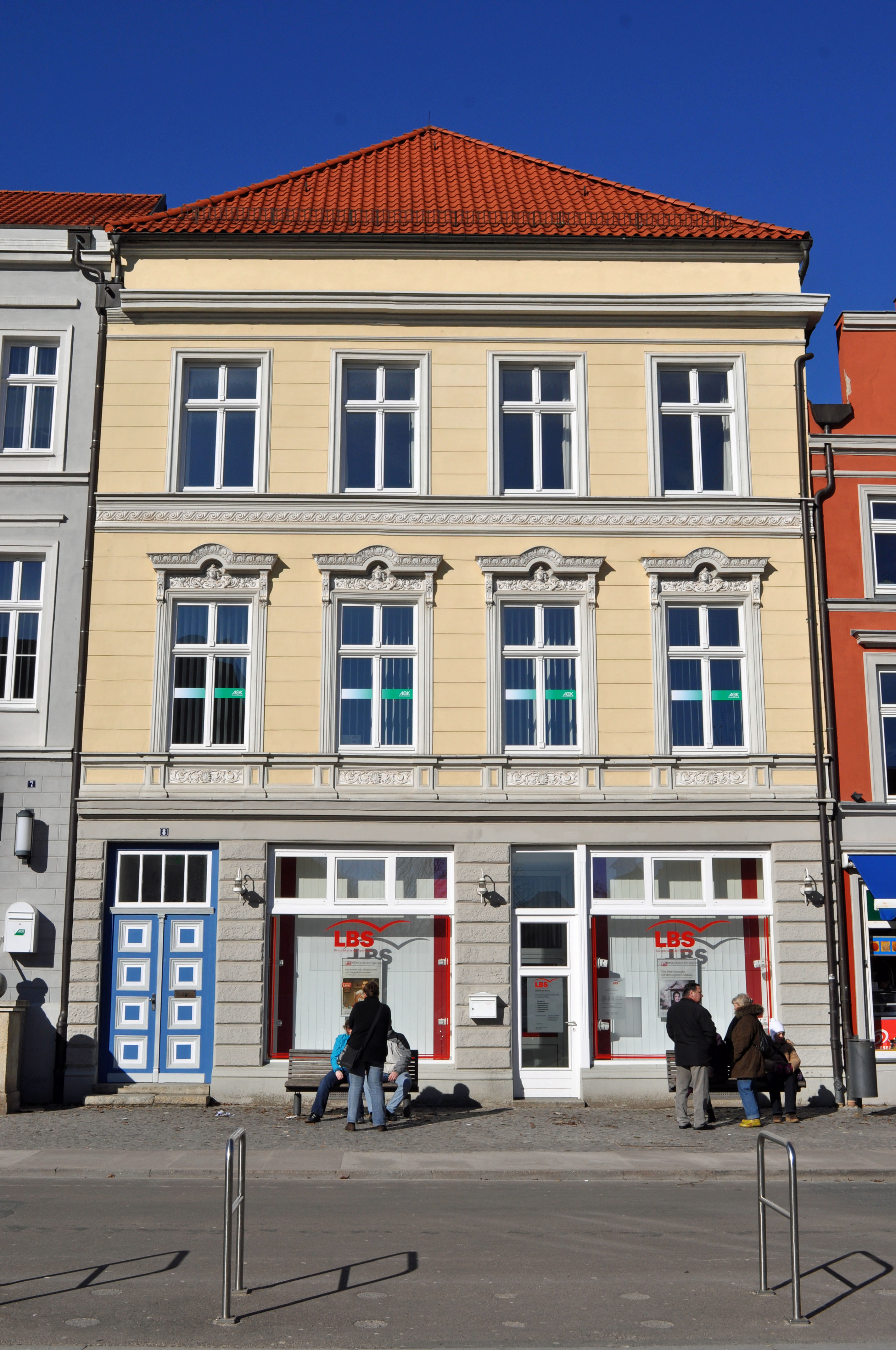 Gebäude bzw. Gebäudedetail in Stralsund. Straße und Hausnummer siehe Dateiname. Das Gebäude ist als Baudenkmal ausgewiesen, siehe dazu die Liste der Baudenkmale in Stralsund.